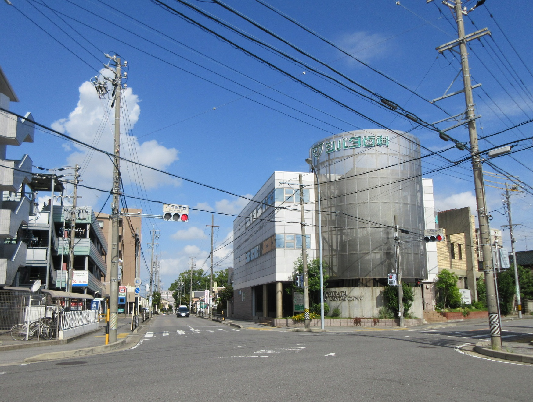 JR岡崎駅西交差点（岡崎市羽根西、羽根西新町）